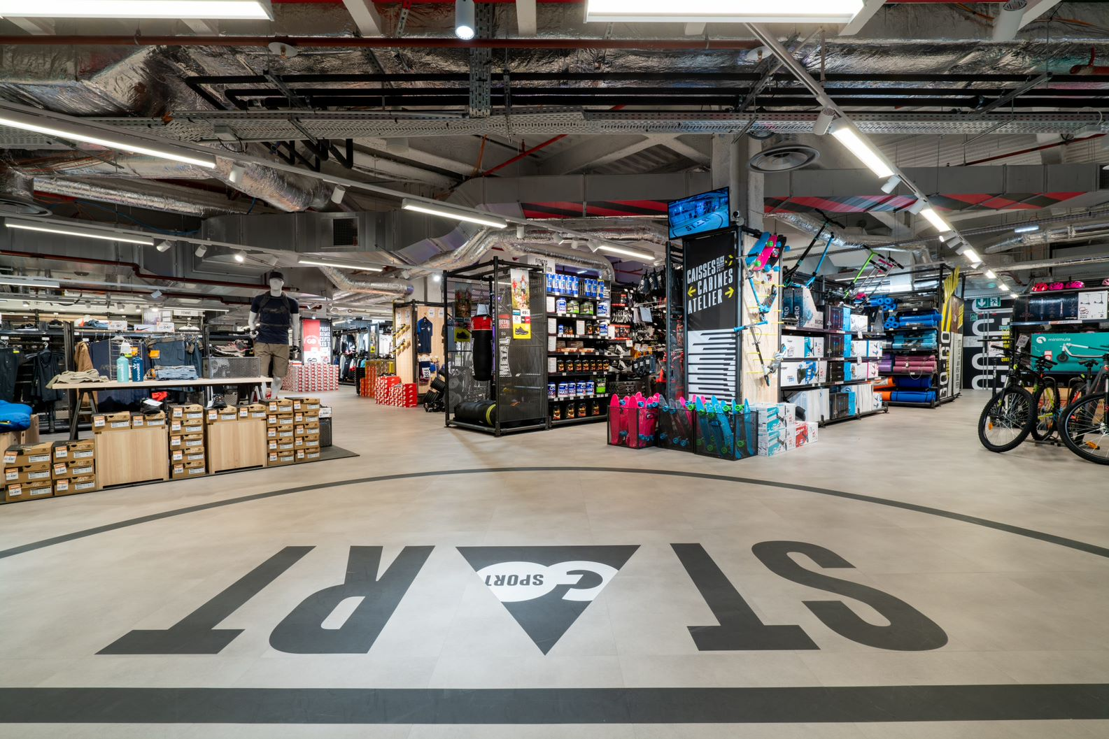 L'entrée du magasin GO Sport, dans le centre commercial SO Ouest, à Levallois-Perret